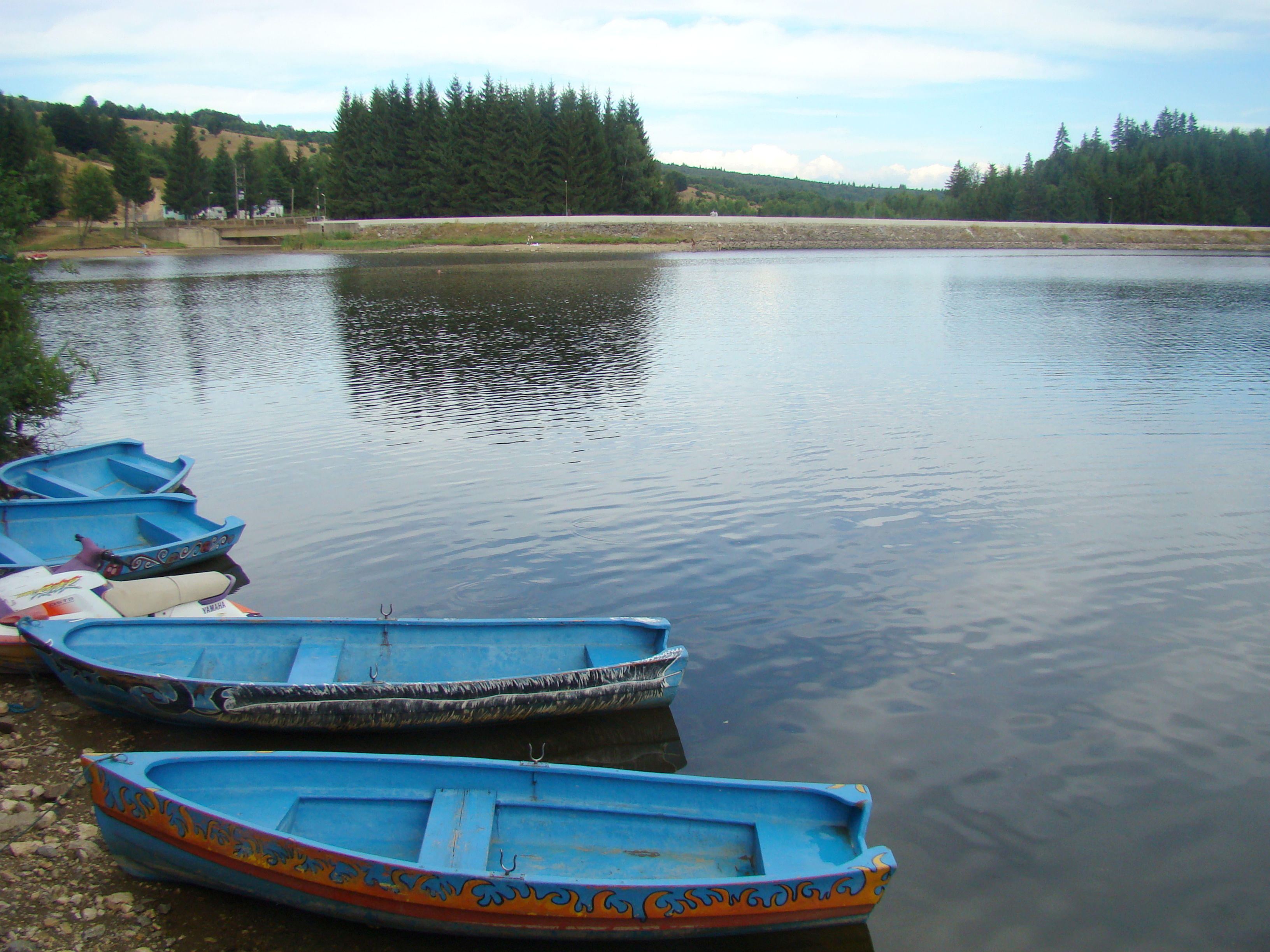 Staţiunea şi lacul de acumulate Trei Ape, judeţul Caraş-Severin